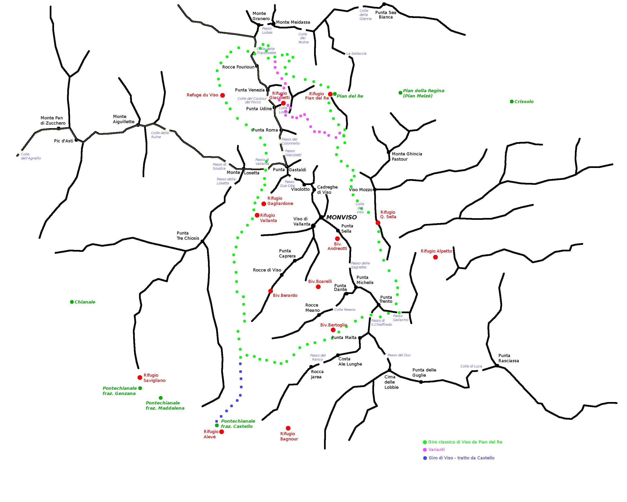 Topografia della zona del Monviso con indicati: centri abitati, creste principali, vette principali, rifugi, valichi, tracciato del giro di Viso